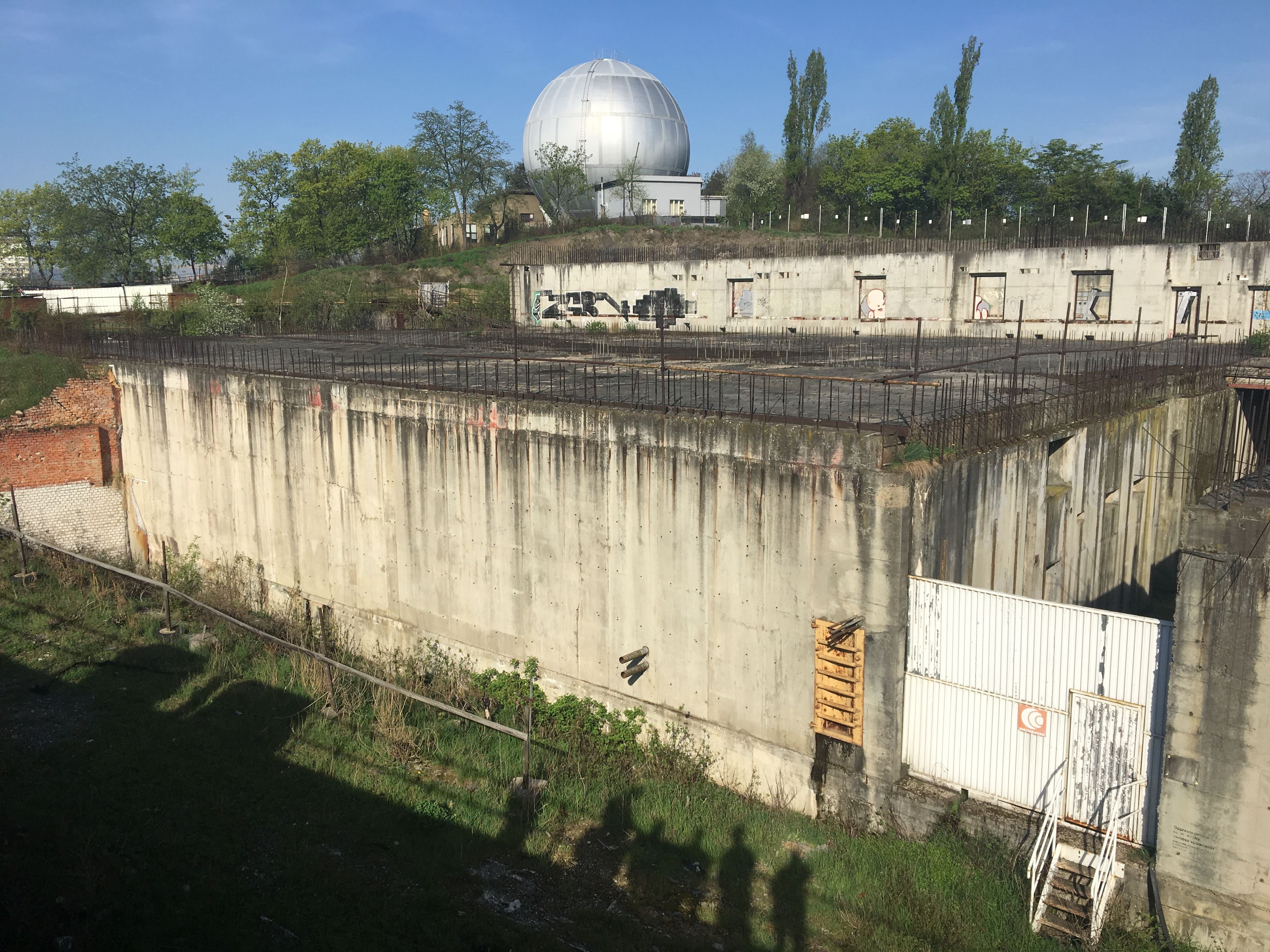 Rozestavěné technické centrum TC4 Palmovka, součást ochranného systému metra v Praze.